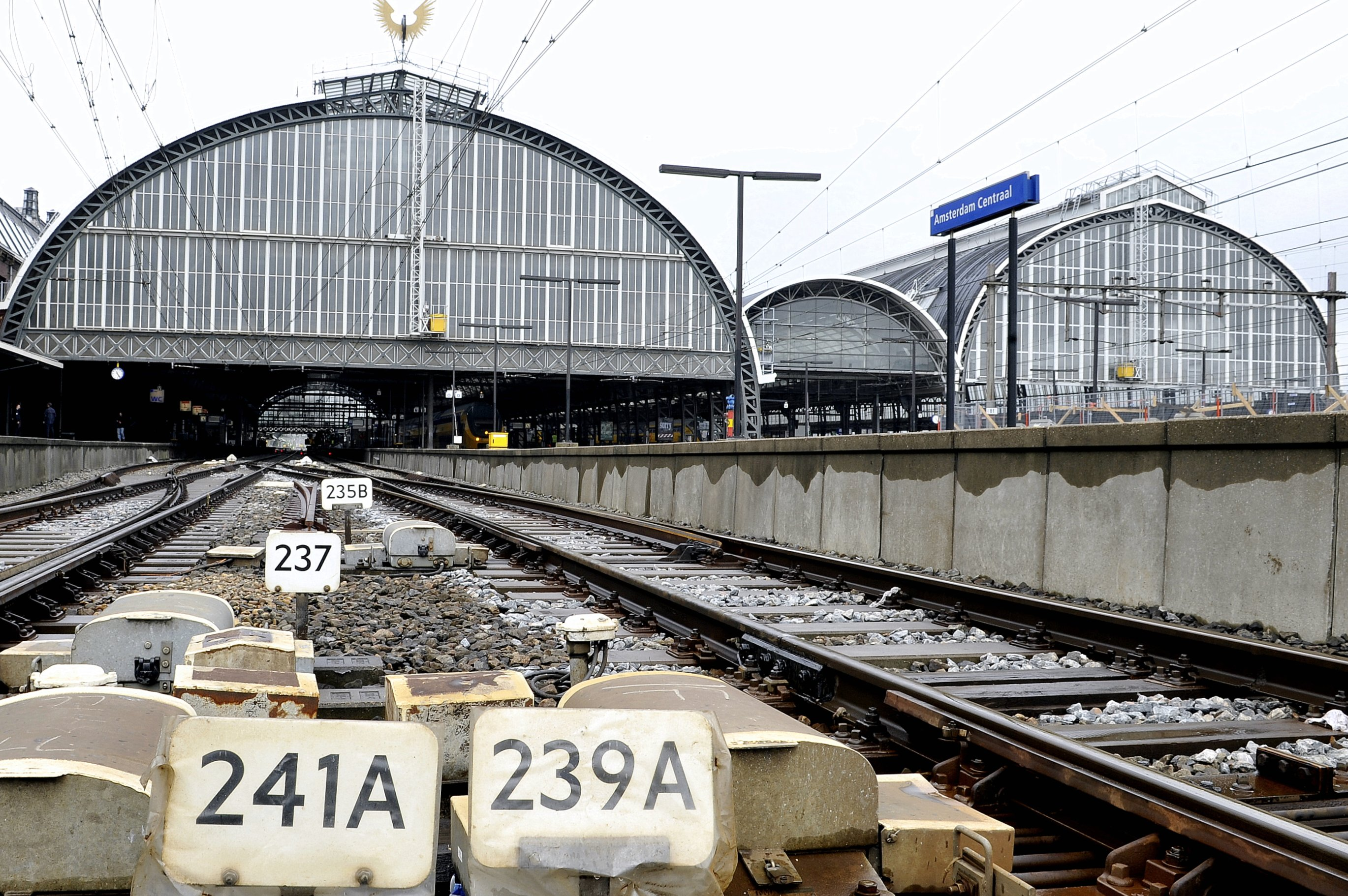 Amsterdam Central station